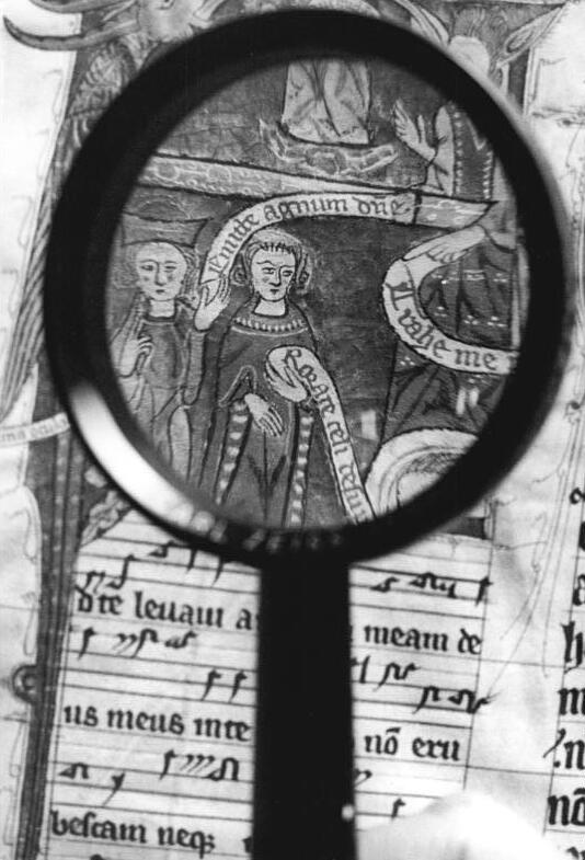 Illustration, mittelalterliches Messbuch ADN-ZB Ludwig-19.8.85-se-Bez. Erfurt-Literarische Entdeckung Blick in ein Missale (Meßbuch) aus dem 14. Jahrhundert, das zur umfangreichen Handschriftensammlung der Gothaer Forschungsbibliothek gehört. Wichtige Einzelheiten in den mittelalterlichen Schriften sind manchmal nur mit der Lupe erkennbar. Durch die sorgfältige wissenschaftliche Erschließungsarbeit wurde jetzt ein Gedicht des italienischen Dichters und Humanisten Francesco Petrarca (1304 - 1374) entdeckt. (s.auch 16,17 und 19N) Information added by Wikimedia users.The page shows the introit for the first Sunday in Advent: Ad te levavi animam meam